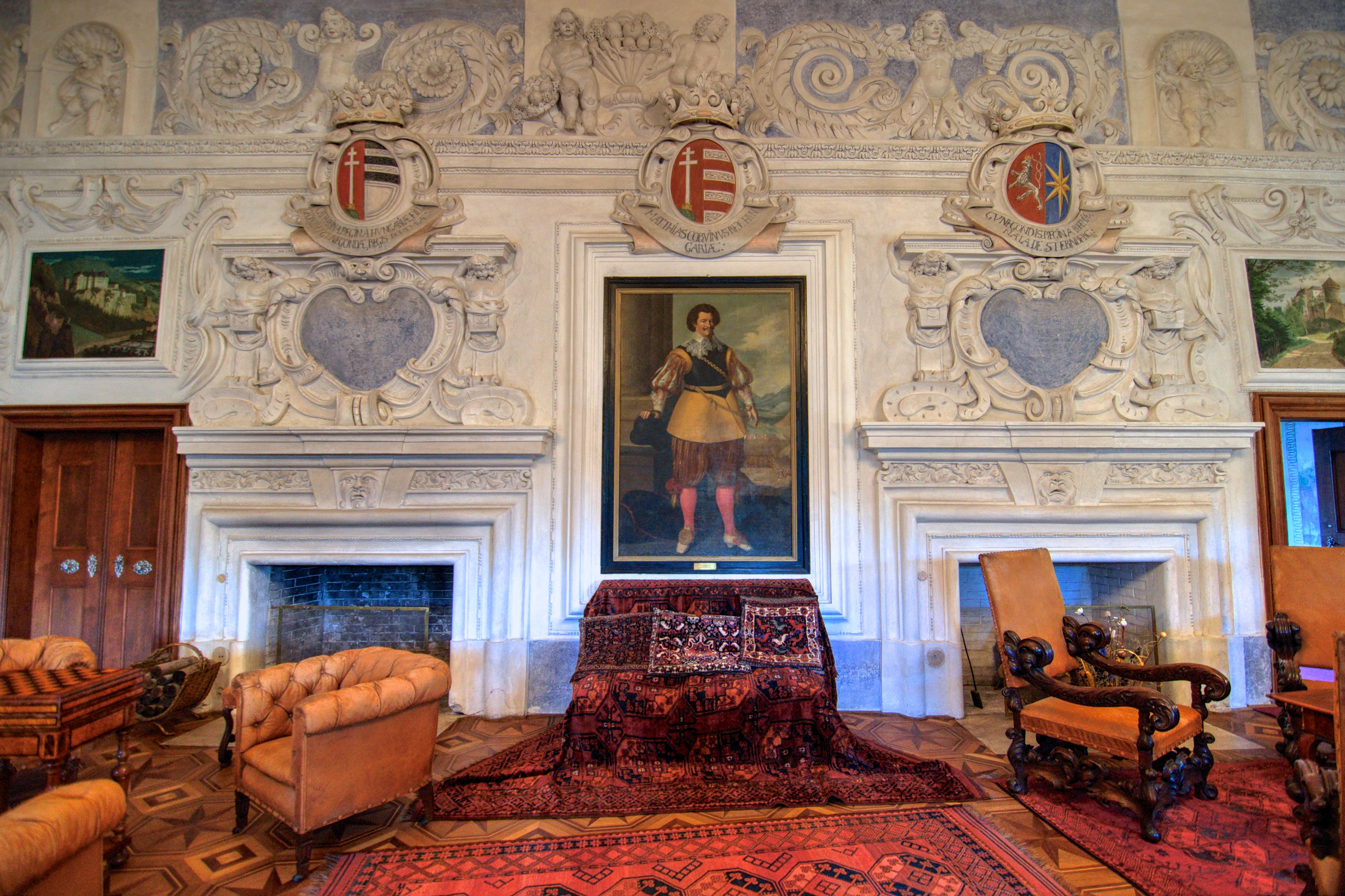 Interiér Velkého rytířského sálu na hradě Český Šternberk. RYTÍŘSKÝ SÁL Sál je největší a nejreprezentativnější místností hradu. Stěny jsou dekorovány raně barokní štukovou výzdobou od Itala Carla Brentana. Erby upomínají na slavné předky a významné sňatky rodu. Královský erb v rohu nalevo od kaple patřil českému králi Jiřímu z Poděbrad, jehož manželce Kunhutě ze Sternberga náleží erb sousední. S výjimkou obrazu Jiřího z Poděbrad ostatní portréty se štukovými erby nesouvisejí, jsou na nich vyobrazeni císařští generálové třicetileté války (1618- 1648). Nábytek v sále ukazuje, jak se měnila dobová móda; nové vybavení ale starý nábytek ne vždy úplně nahradilo, spíše jen doplnilo. Nejstarší, z 16. století, jsou černé renesanční truhly mezi okny. Dominuje však nábytek v duchu baroka, a to jak růžová anglická sedací souprava Chíppendale, tak české mohutné a bohatě vyřezávané a intarzované neobaroko. Na počátku 20. století byla poříze­na prostřední sedací souprava i dva velké lustry z českého křišťálu, vyrobené v Novém Boru přímo na míru při elektrifikaci hradu v r. 1911. Český Šternberk. Okr. Benešov. Středočeský kraj. Czech Republik.